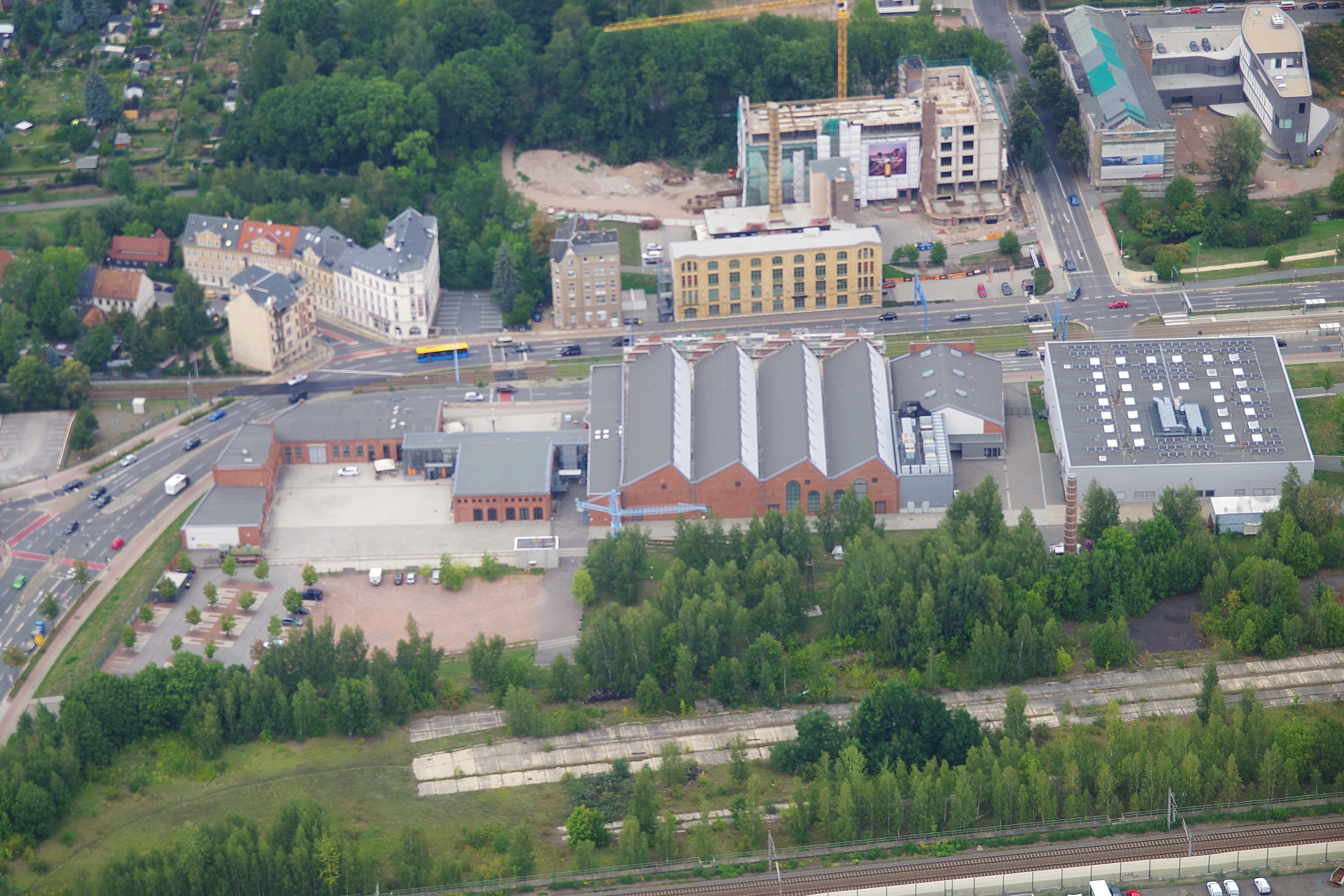 Kappler Drehe mit Industriemuseum Chemnitz